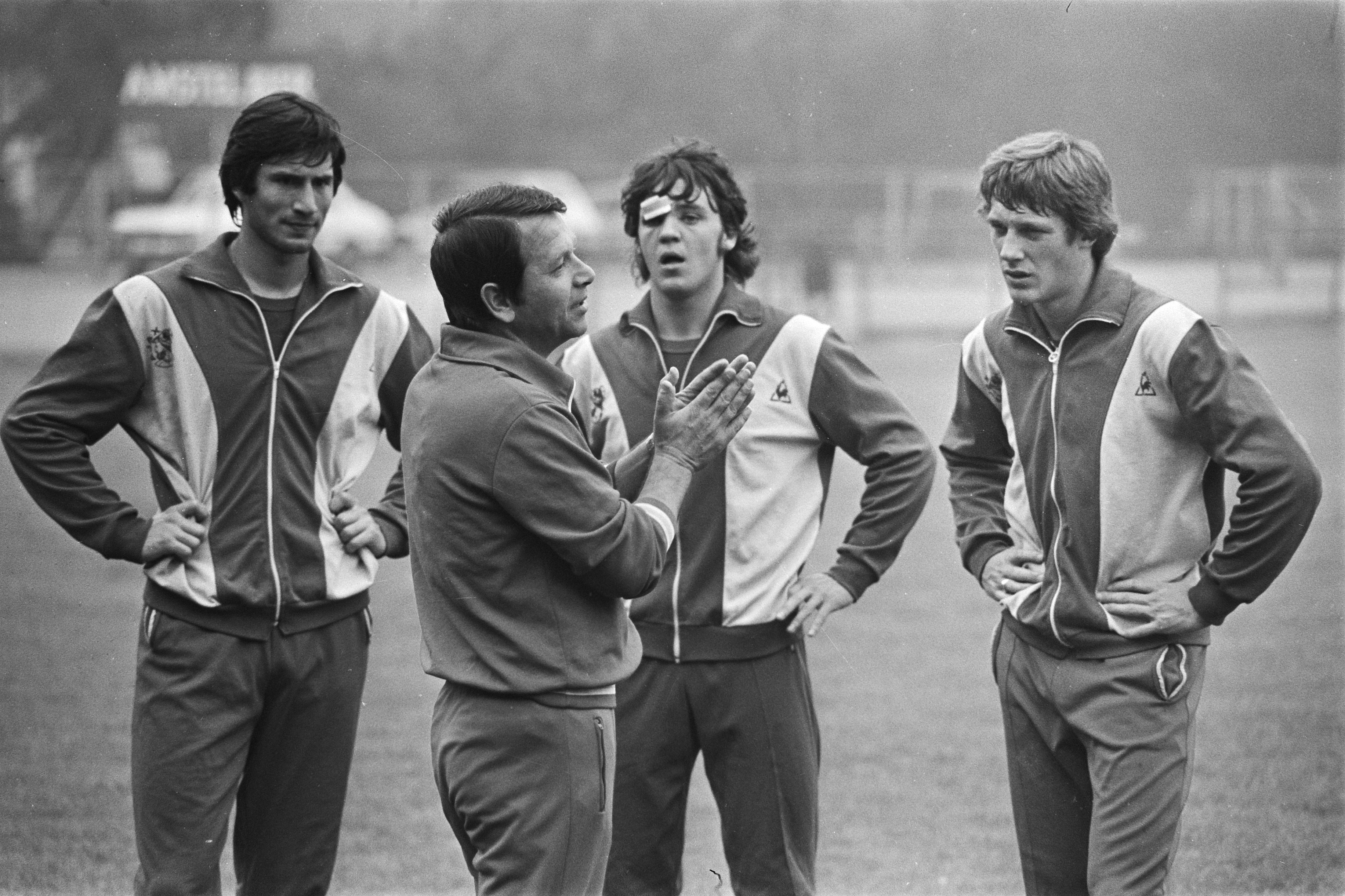 Collectie / Archief : Fotocollectie Anefo Reportage / Serie : [ onbekend ] Beschrijving : Training Ajax; trainer Ivic en v.l.n.r. Ling, Lamain en Bouwma Datum : 26 september 1977 Trefwoorden : sport, voetbal Persoonsnaam : Ivic Fotograaf : Verhoeff, Bert / Anefo Auteursrechthebbende : Nationaal Archief Materiaalsoort : Negatief (zwart/wit) Nummer archiefinventaris : bekijk toegang 2.24.01.05 Bestanddeelnummer : 929-3664